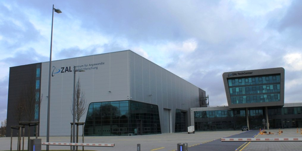 Außenansicht Große Halle und Eingangsbereich